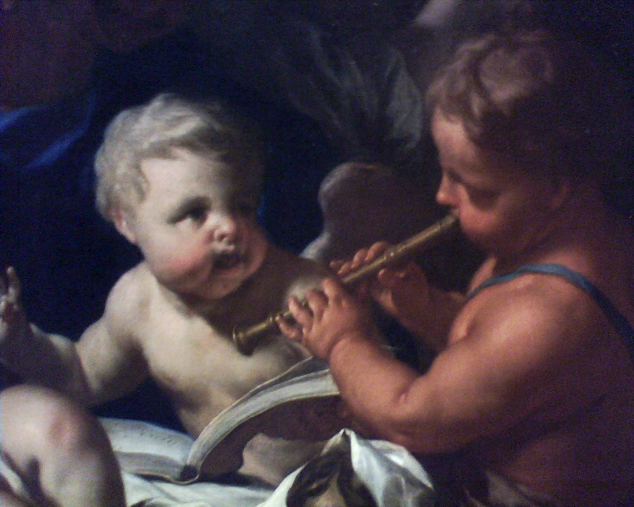 detail